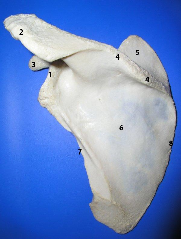 התמונה המקורית מויקישיתוף: נערכה על ידי והועלתה מחדש